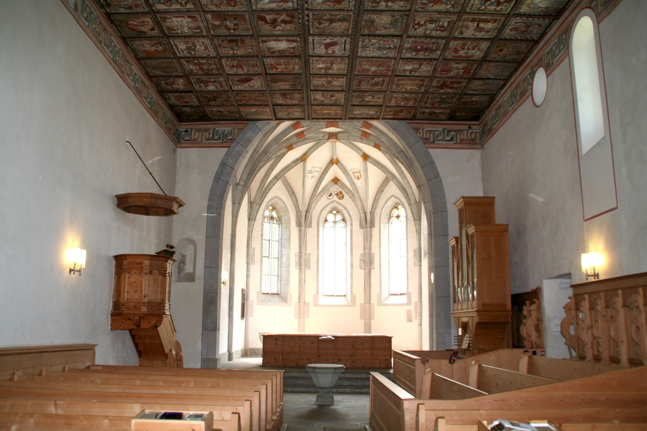 Church St. Martin (Zillis) Innenraum